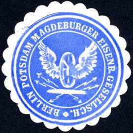 Siegelmarke der Berlin-Potsdam-Magdeburger Eisenbahn-Gesellschaft, die 1880 Teil der Preußischen Staatsbahnen wurde